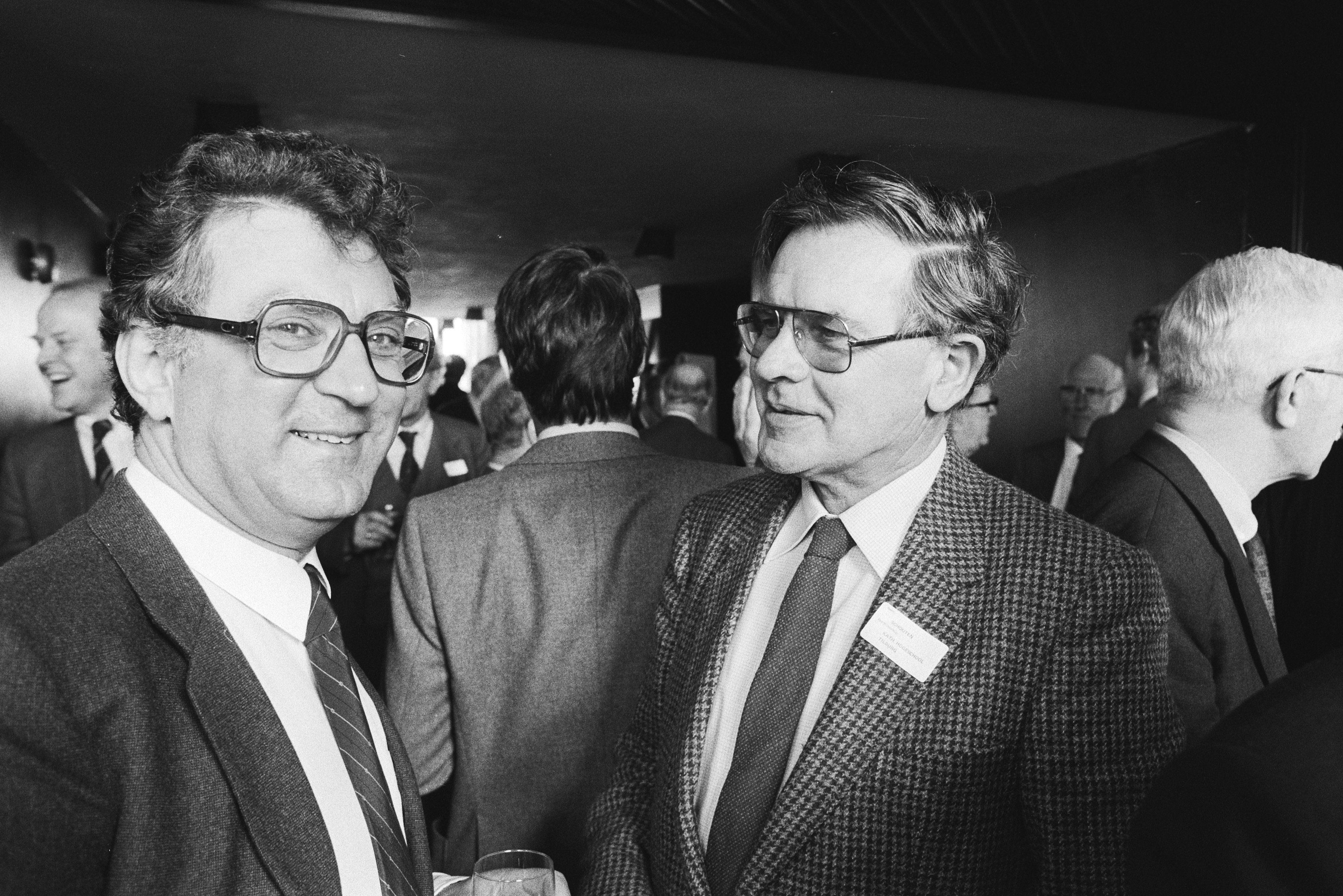 Collectie / Archief : Fotocollectie Anefo Reportage / Serie : Symposium "De Industrie Uitgedaagd", georganiseerd door Elseviers Weekblad Beschrijving : Prof. Heertje (l) en prof. Schouten Datum : 11 maart 1983 Trefwoorden : conferenties, groepsportretten, ondernemingen Persoonsnaam : Heertje, Arnold Fotograaf : Croes, Rob C. / Anefo Auteursrechthebbende : Nationaal Archief Materiaalsoort : Negatief (zwart/wit) Nummer archiefinventaris : bekijk toegang 2.24.01.05 Bestanddeelnummer : 932-5300